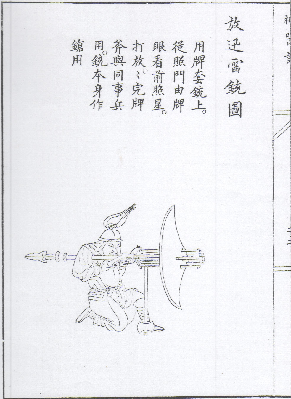 神器譜第二十二頁左半放迅雷銃圖。